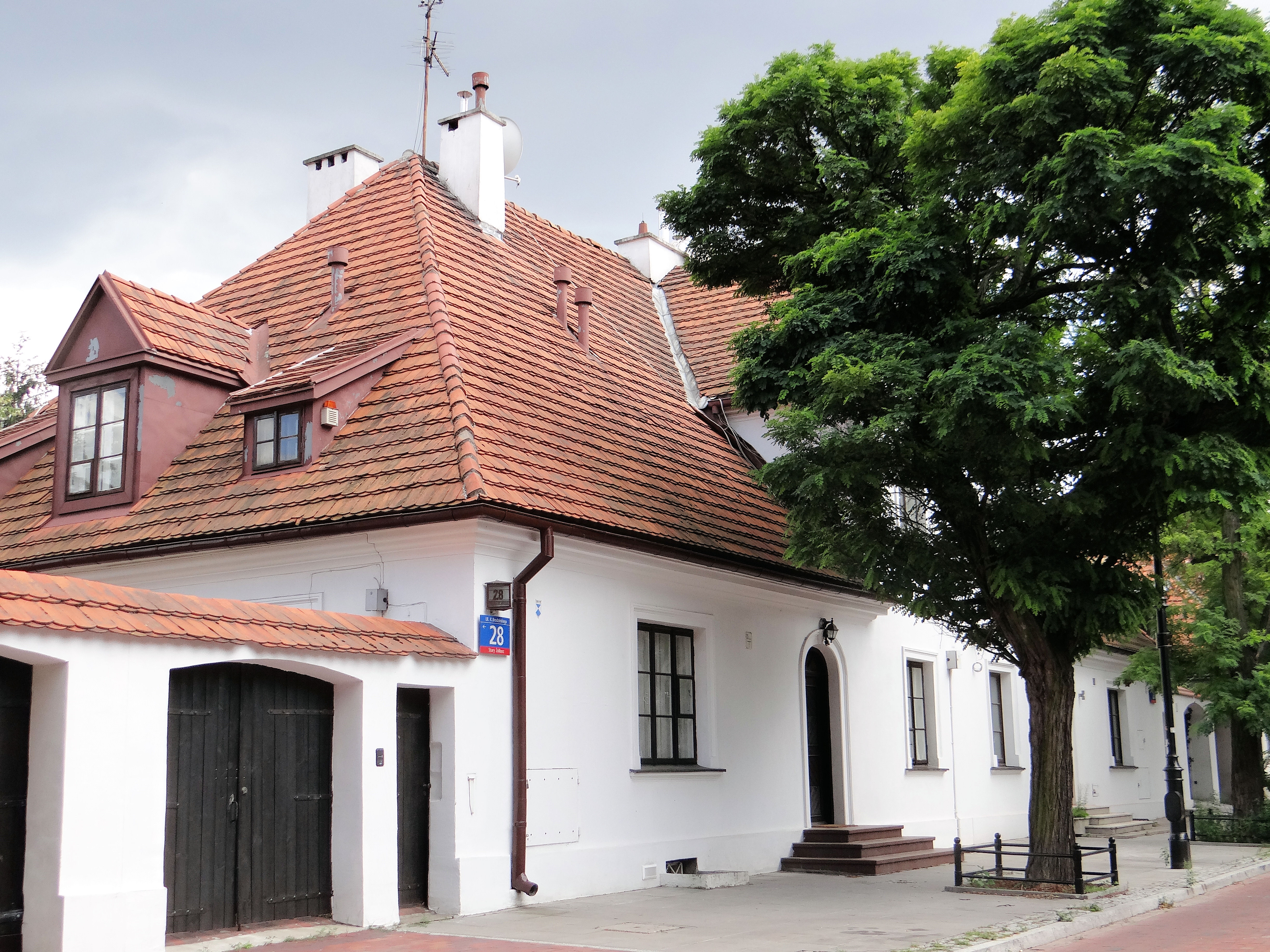 ul Brodzińskiego 28 w Warszawie